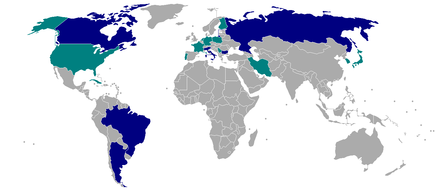 لیگ جهانی والیبال ۲۰۱۳